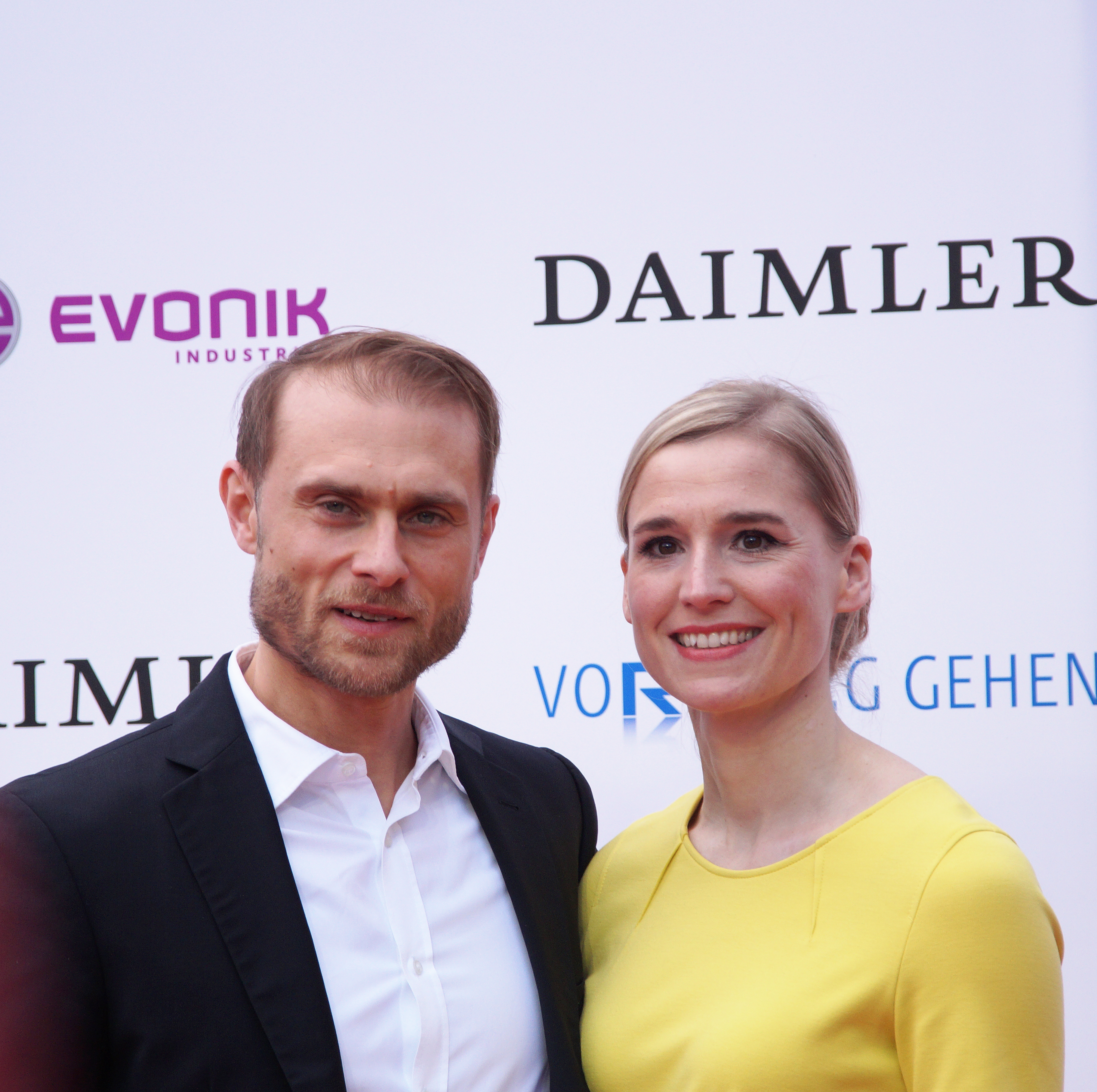 Arne Nolting und Begleitung bei der Verleihung des 'Grimme Preis 2016' am 08.04.2016 in Marl.